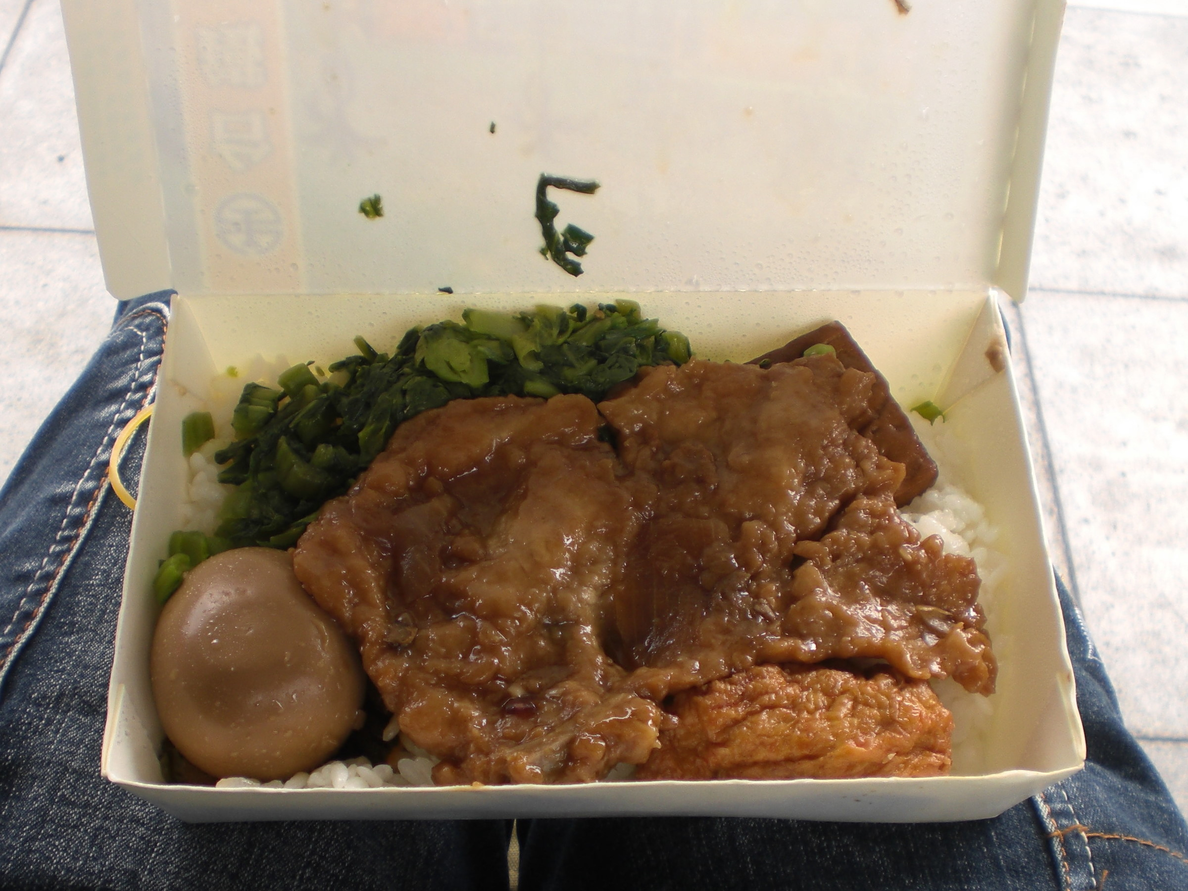 中文（台灣）: 臺灣鐵路管理局汐止車站於2013年3月16日賣出的臺鐵排骨便當內裝。